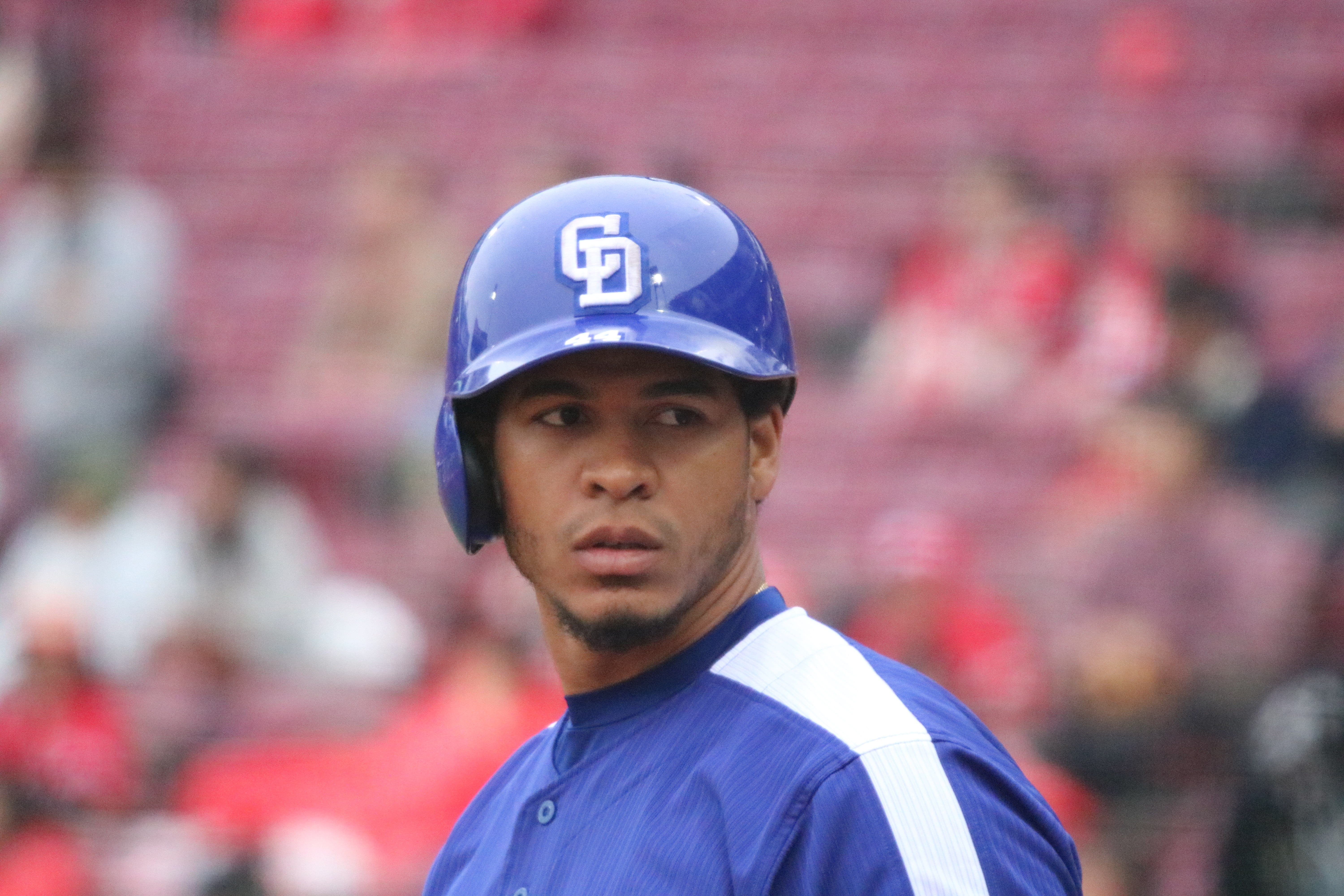 2018/4/14 ウエスタンリーグ